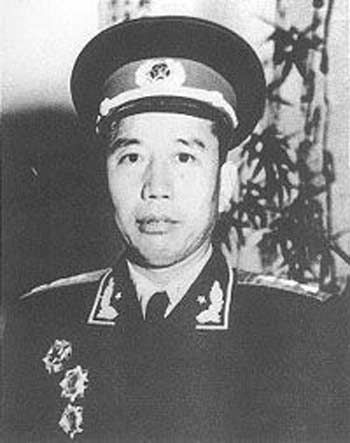 王震将军1955年受勋照